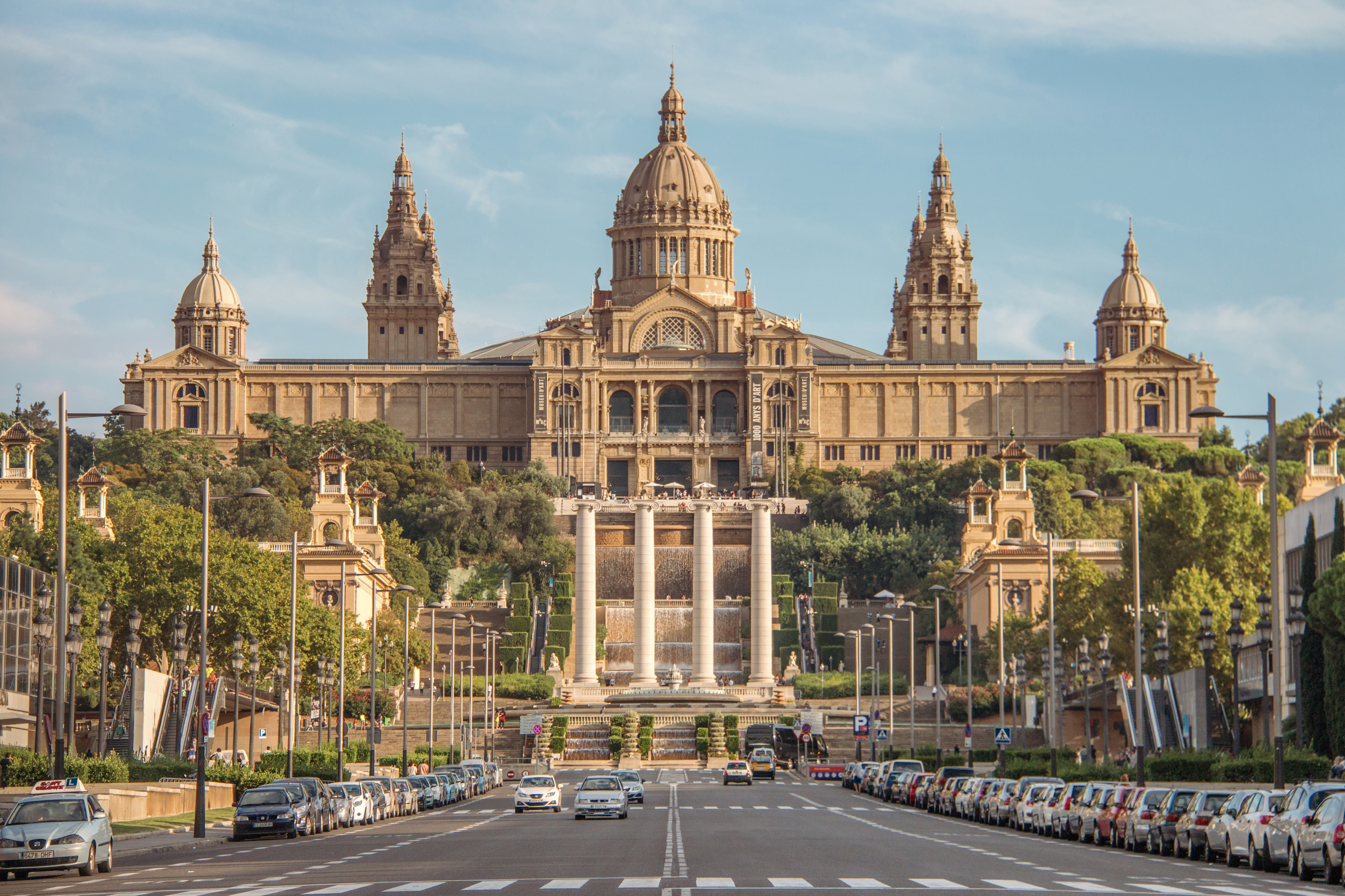 Palau Nacional, Barcelona, España